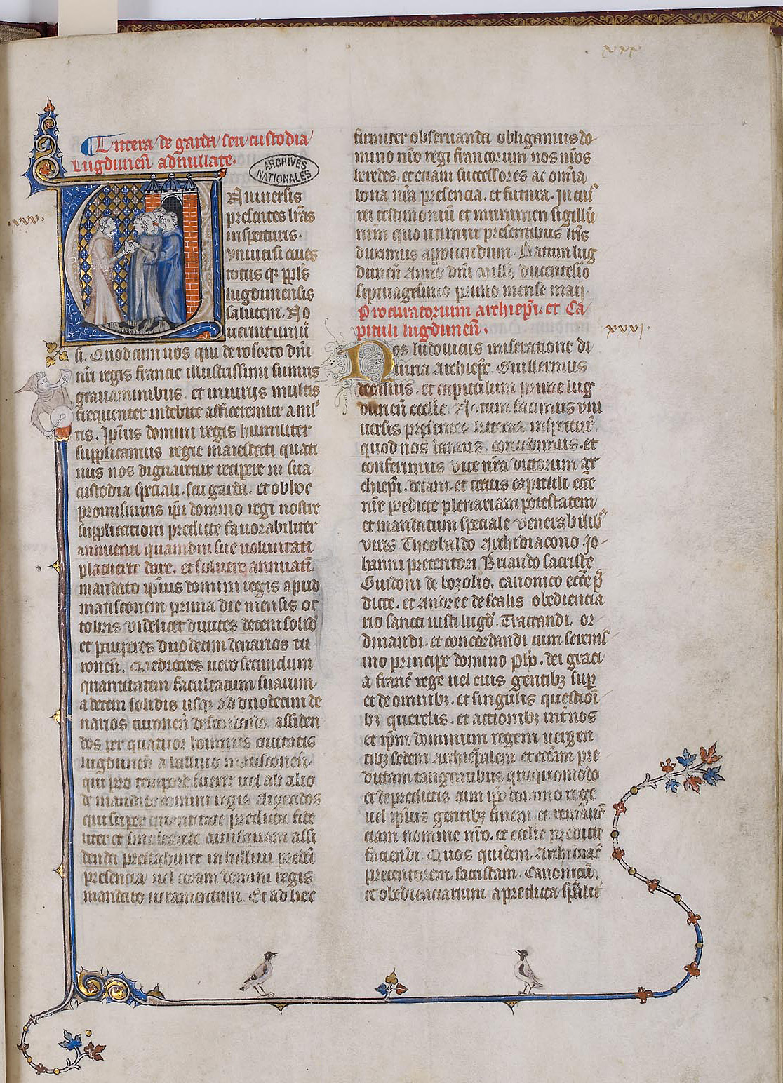 Registre du Trésor des chartes contenant la copie des traités et négociations entre Philippe le Hardi et Philippe le Bel avec l’Angleterre, Lyon, la Flandre et l’Écosse, Vers 1309